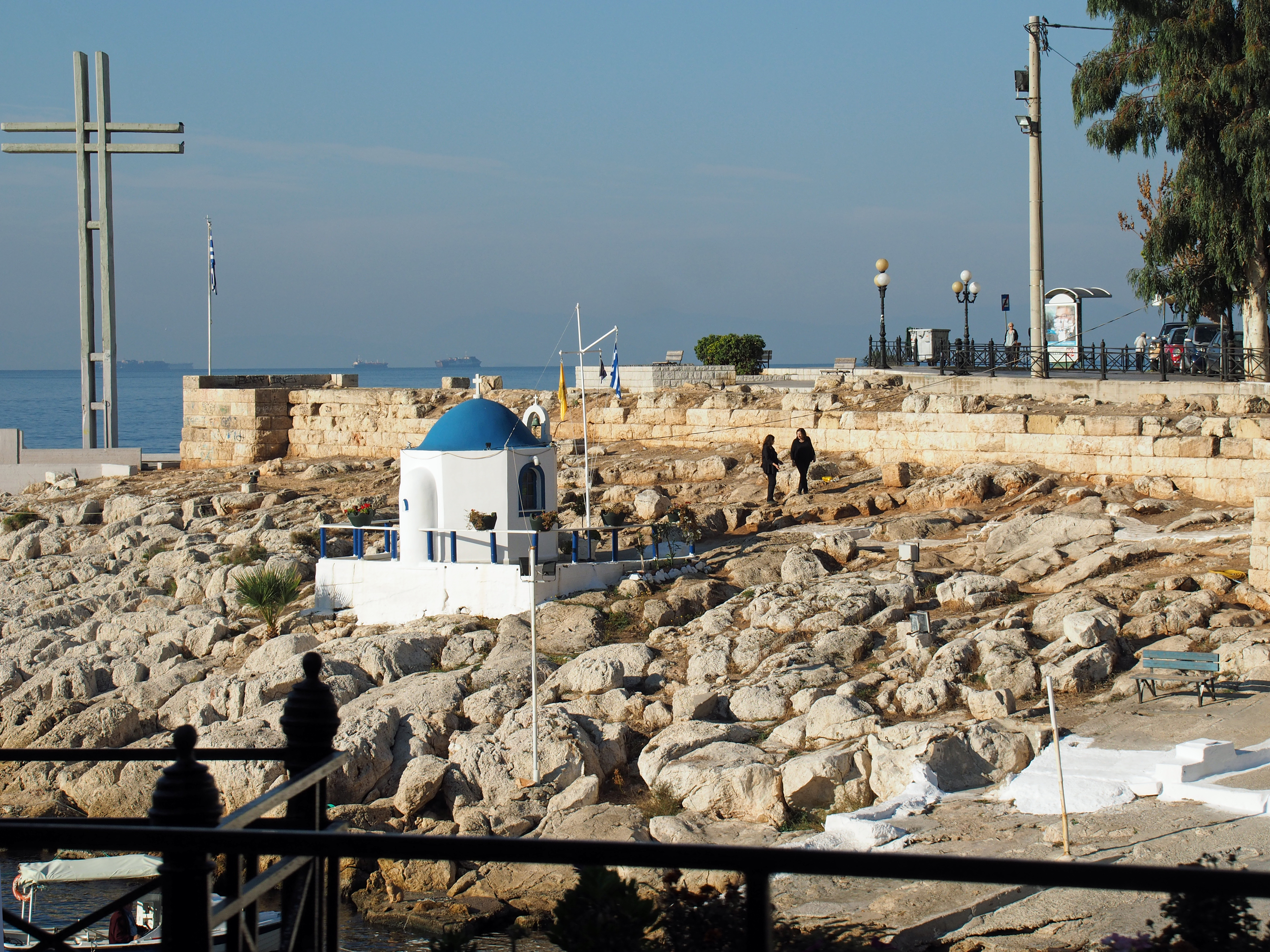 Kleine Kirche am Ufer von Piräus